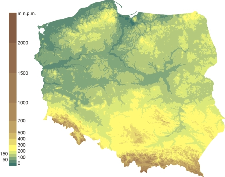 Mapa hipsometryczna Polski. Autor Aotearoa